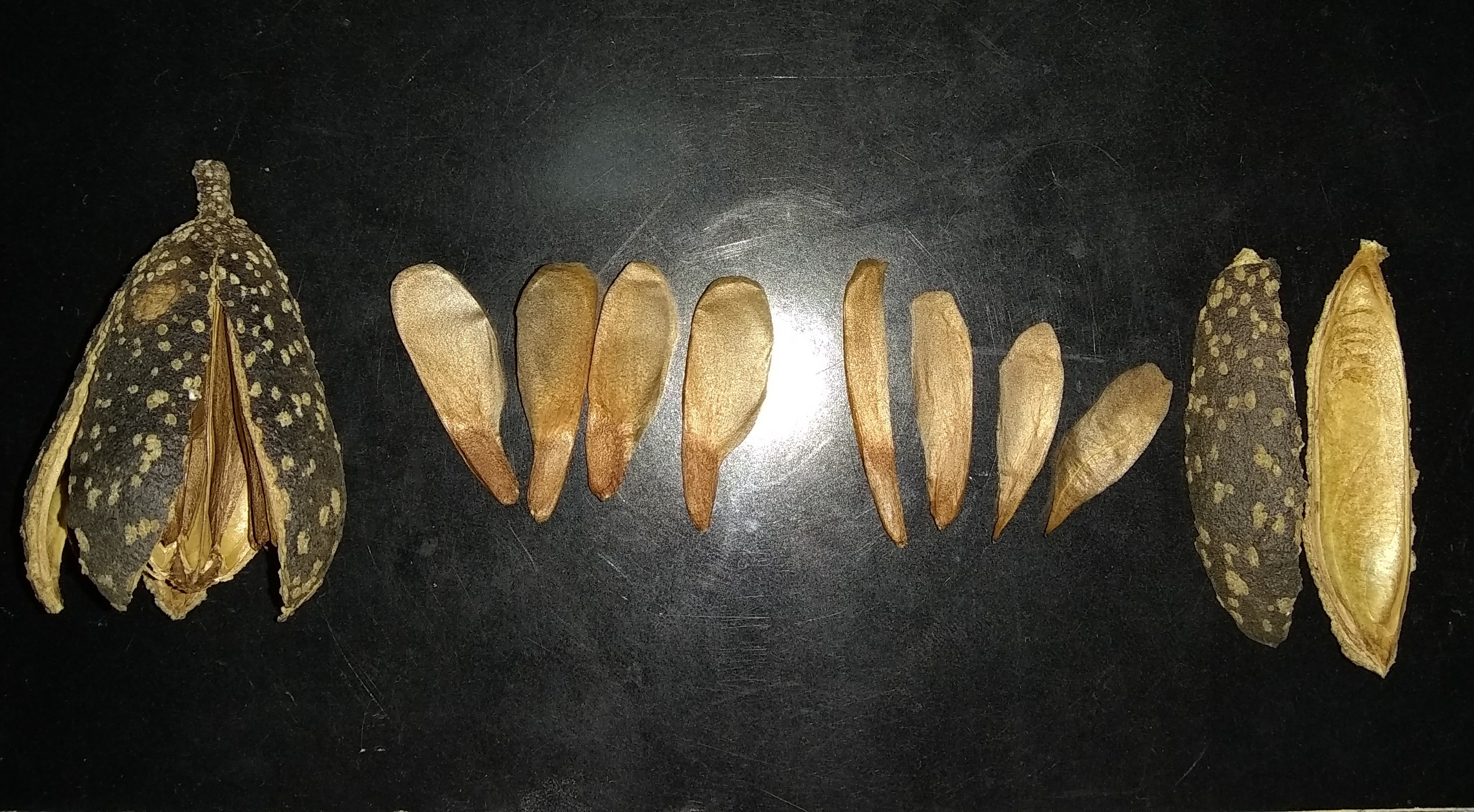 Capsulas y Semillas de Cedro (Cedrela Odorata). De izquierda a Derecha en la imagen, Capsula Abierta, Semillas Viables (Gordas), Semillas Inviables (Delgadas) y Pétalo de Capsula.